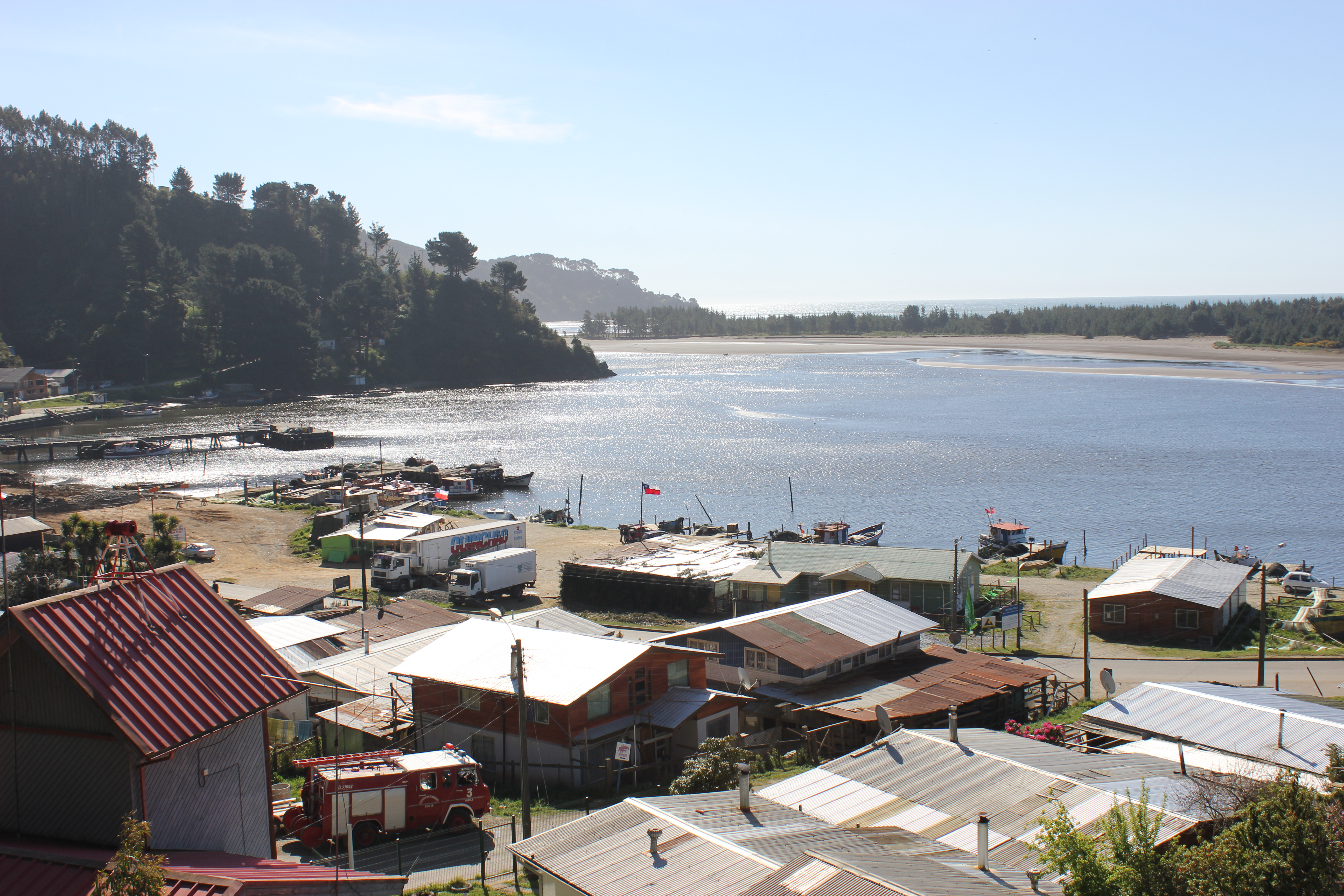 Pueblo de Queule, noviembre 2013.